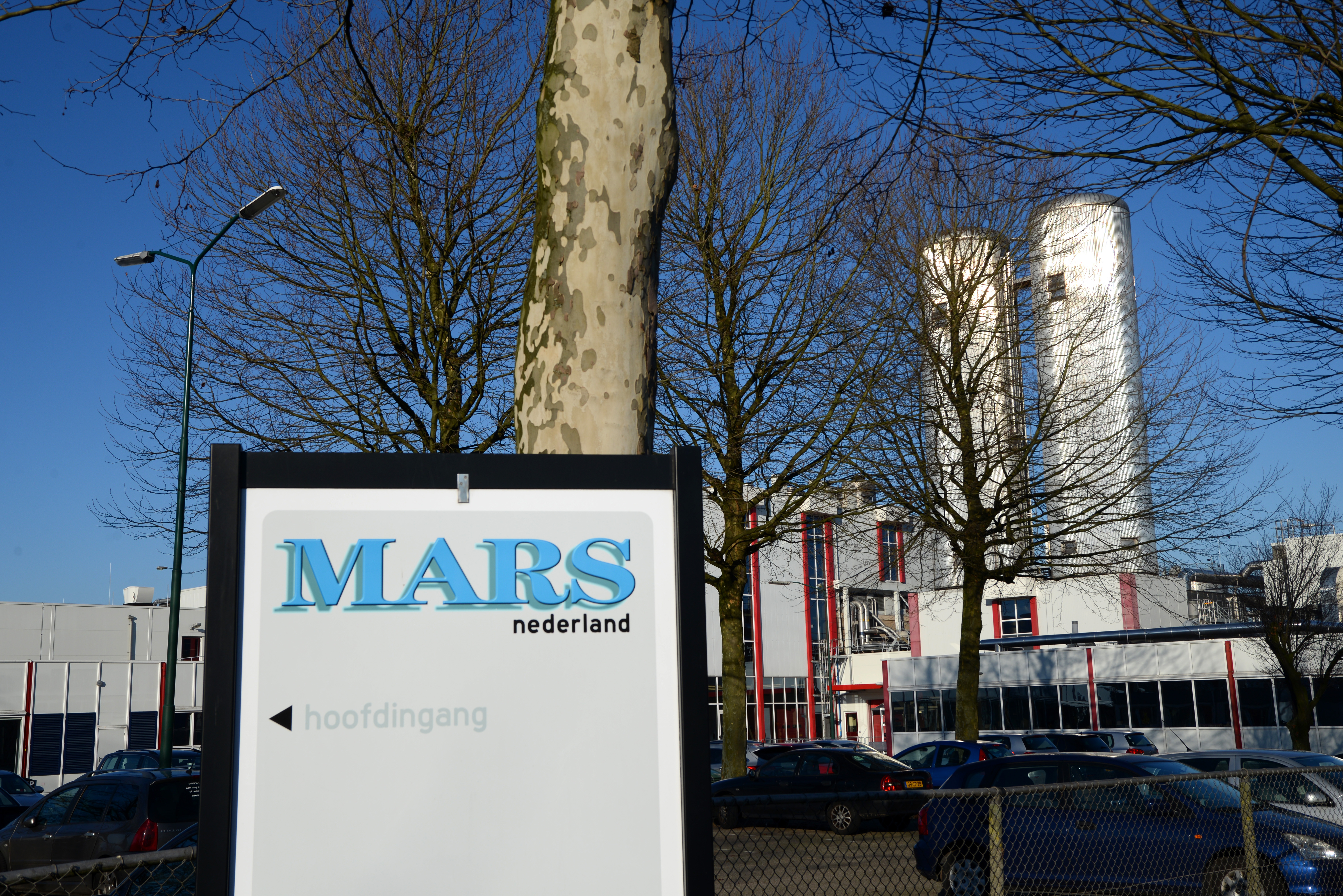 Mars-fabriek in Veghel, Noord-Brabant, voorheen Masterfoods. Mars Nederland B.V., Mars Inc.Taylorweg 55466 AE Veghel